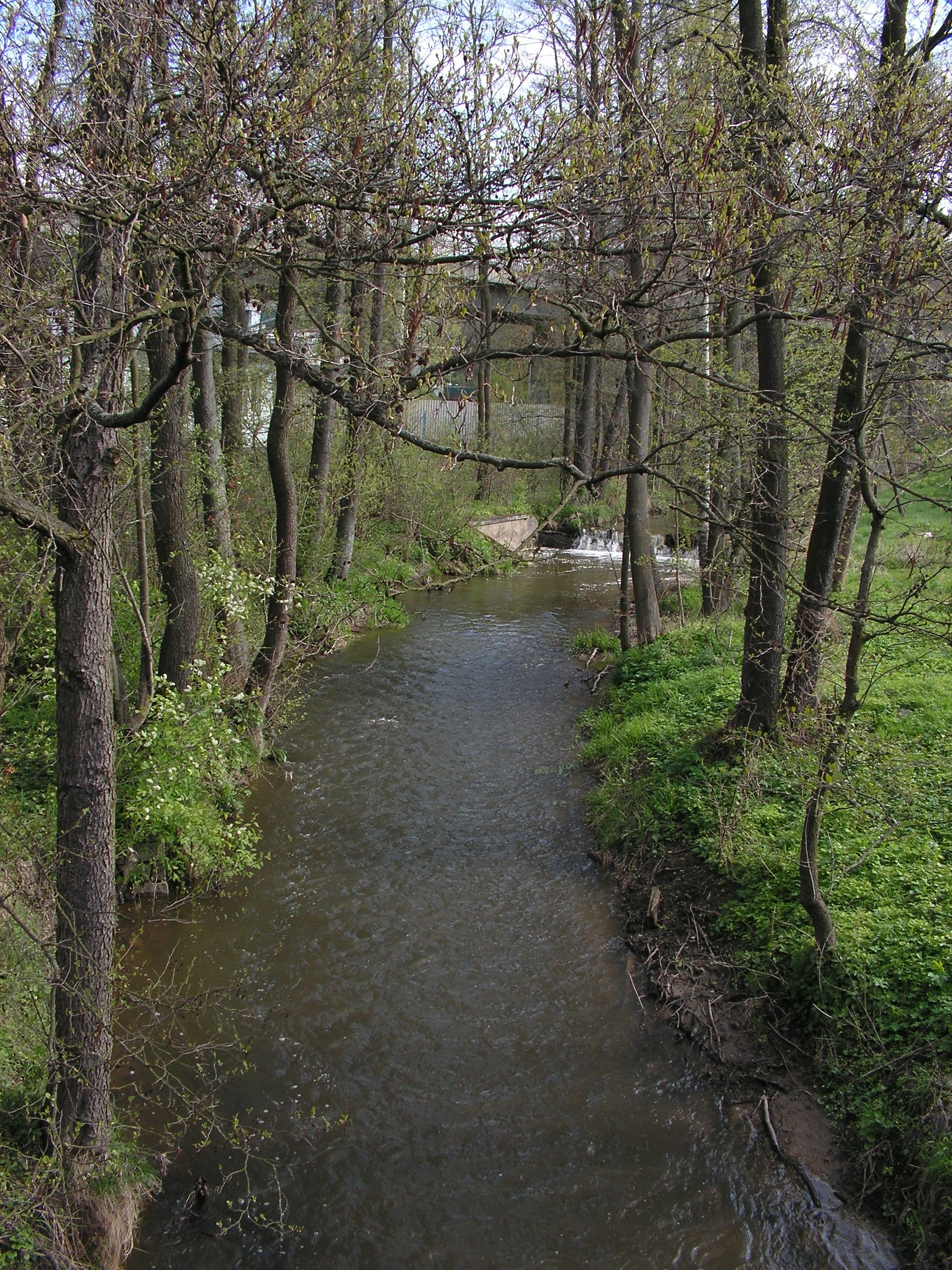 Břevnický potok nedaleko ústí do řeky Sázavy